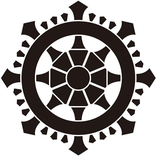 輪宝紋